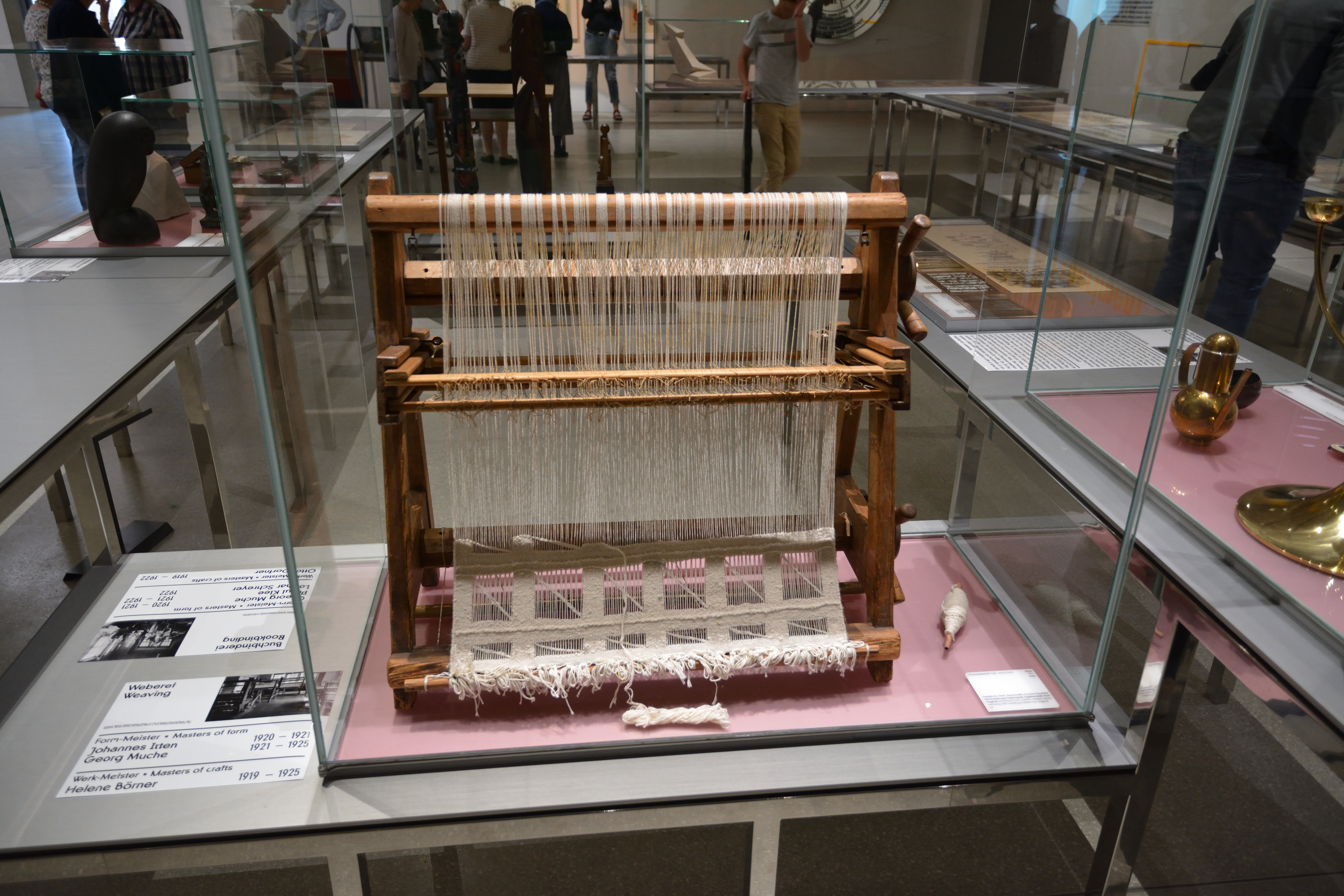 Ein Hochwebstuhl im Bauhaus-Museum in Weinar